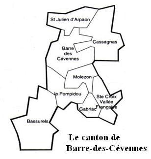 Le canton de Barre-des-Cévennes Image personnelle